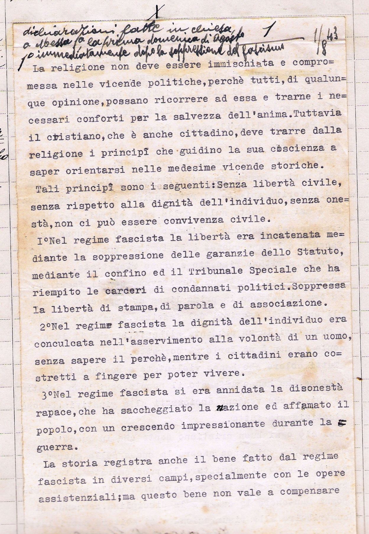 Originale dattiloscritto dell'intervento pubblico tenuto da Mons. Giovanni Quaini contro il fascismo il 1 Agosto 1943 nella Chiesa Parrocchiale di Spino d'Adda